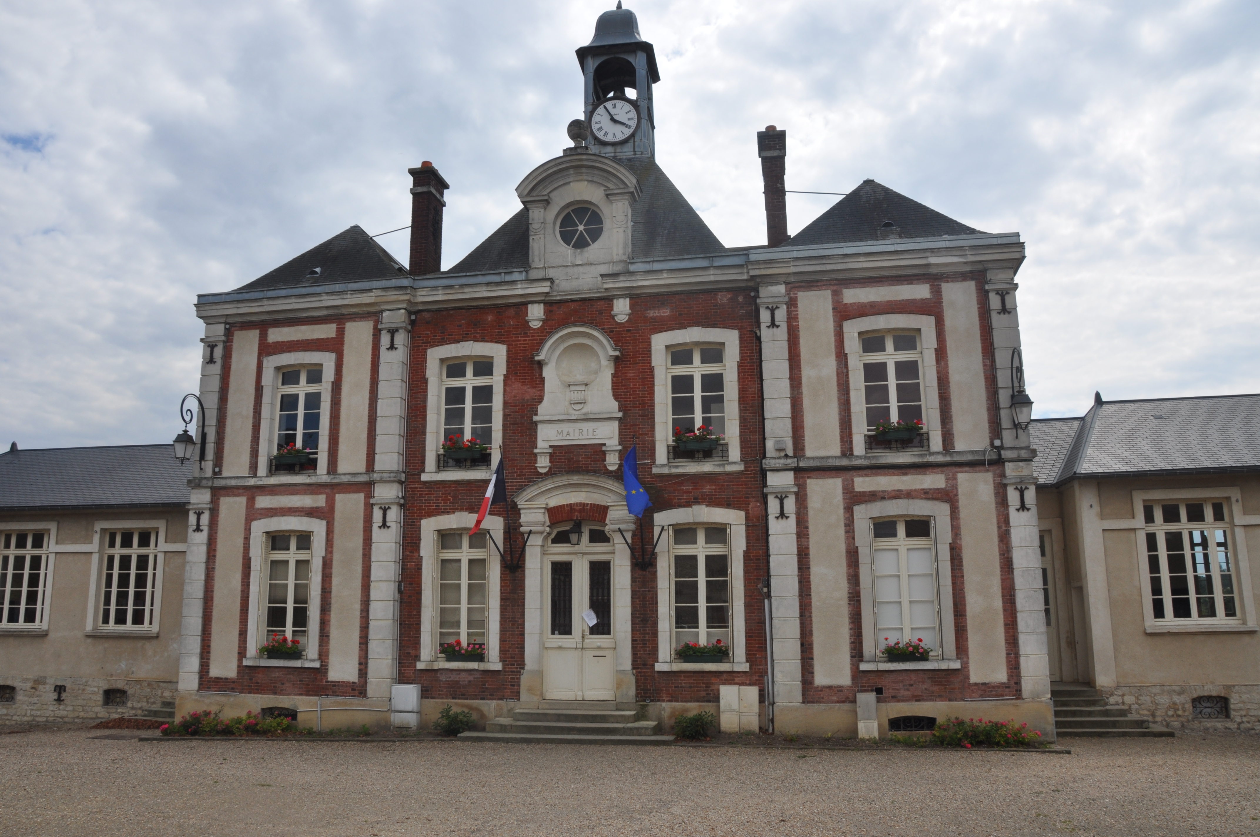 Mairie de Fontenay-Saint-Père, façade nord